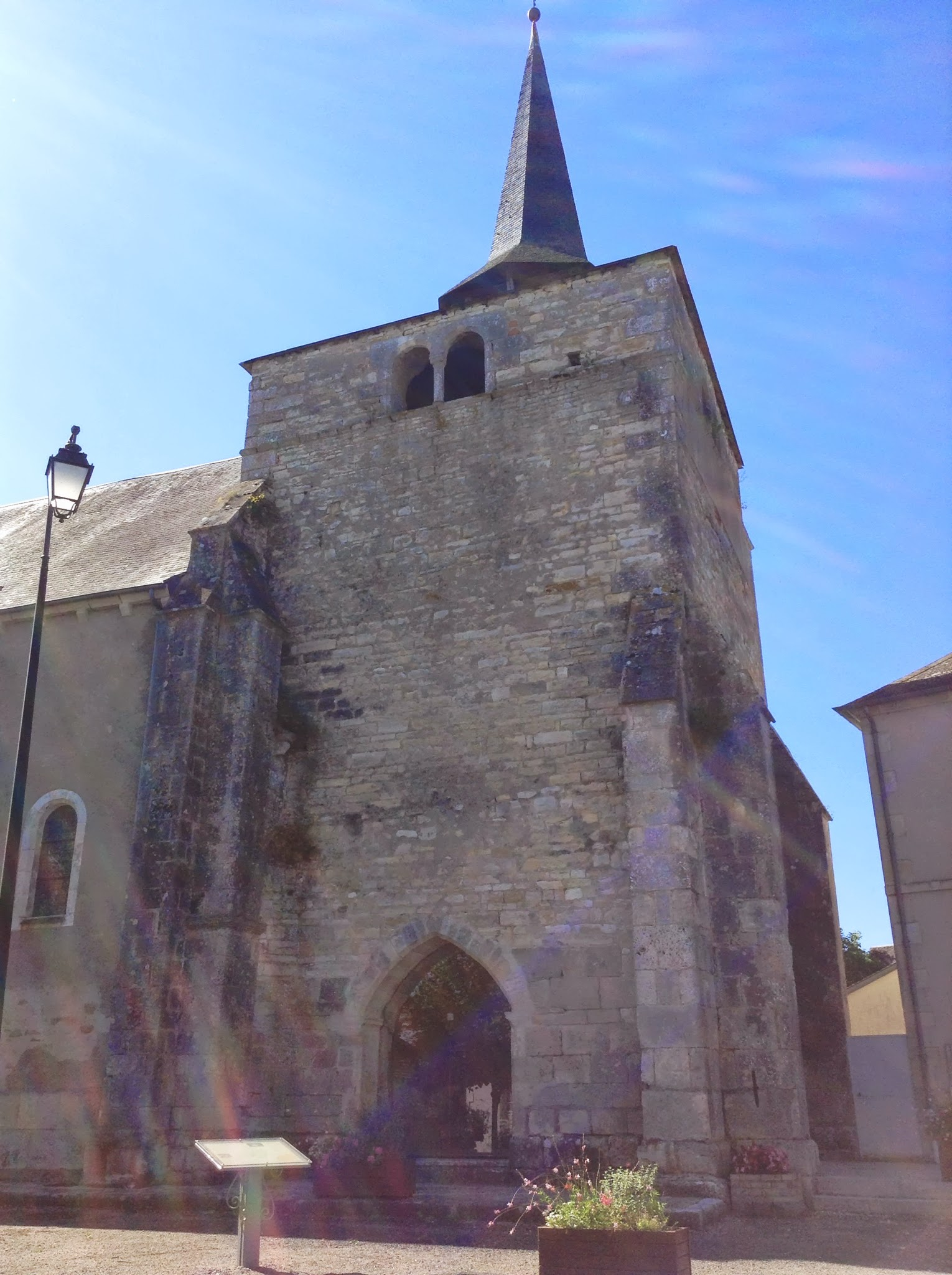 Église Saint-Baudel, Saint-Baudel, Cher